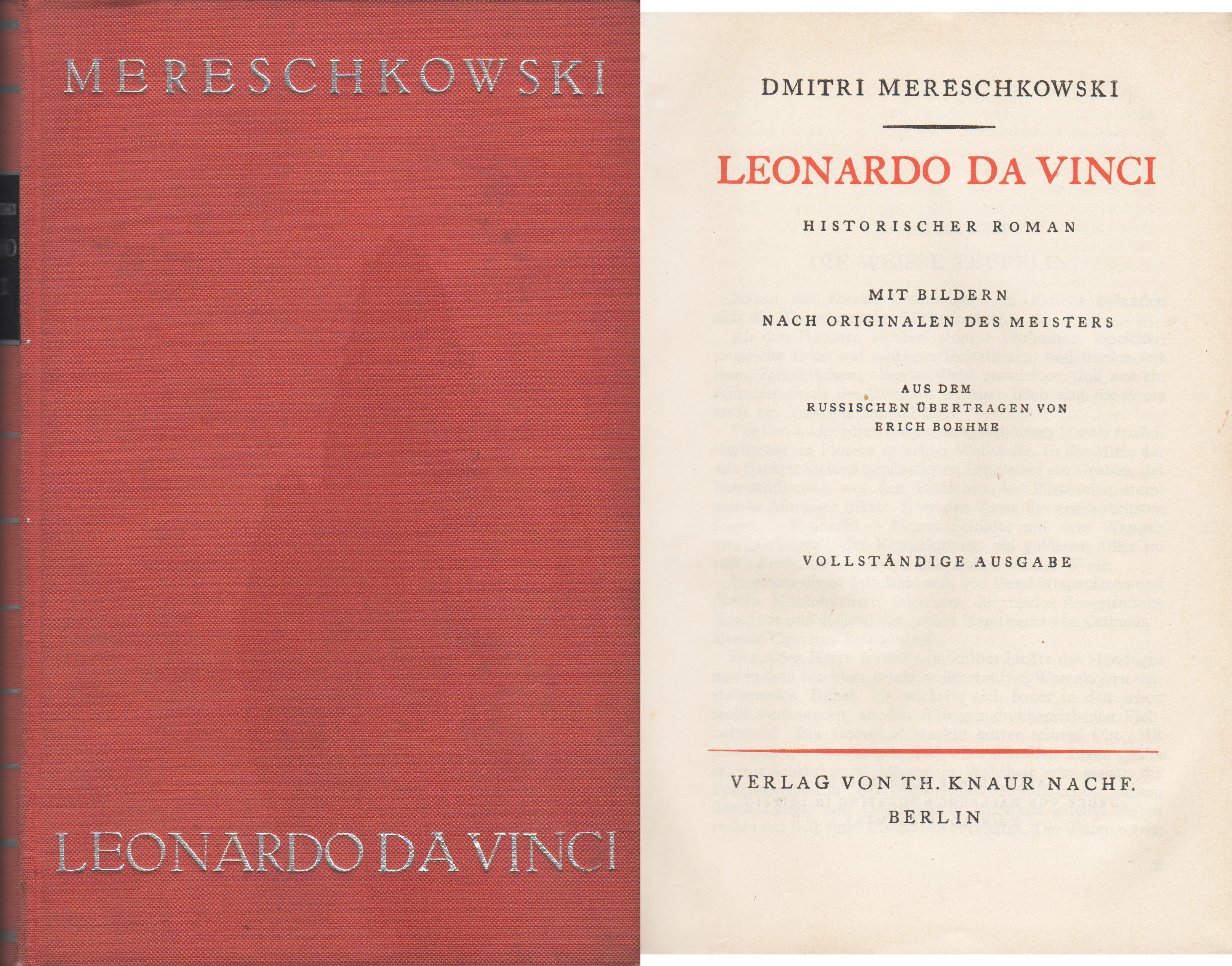 Historischer Roman Leonardo Da Vinci von Dmitri Sergejewitsch Mereschkowski, übersetzt von Erich Böhme, Verlag von Th. Knaur Nachf. Berlin, das Buch enthält 728 Textseiten und 8 auf höherwertigem Papier eingefügte Abbildungen (Buch enthält kein Ausgabedatum und keine Auflagenhöhe)